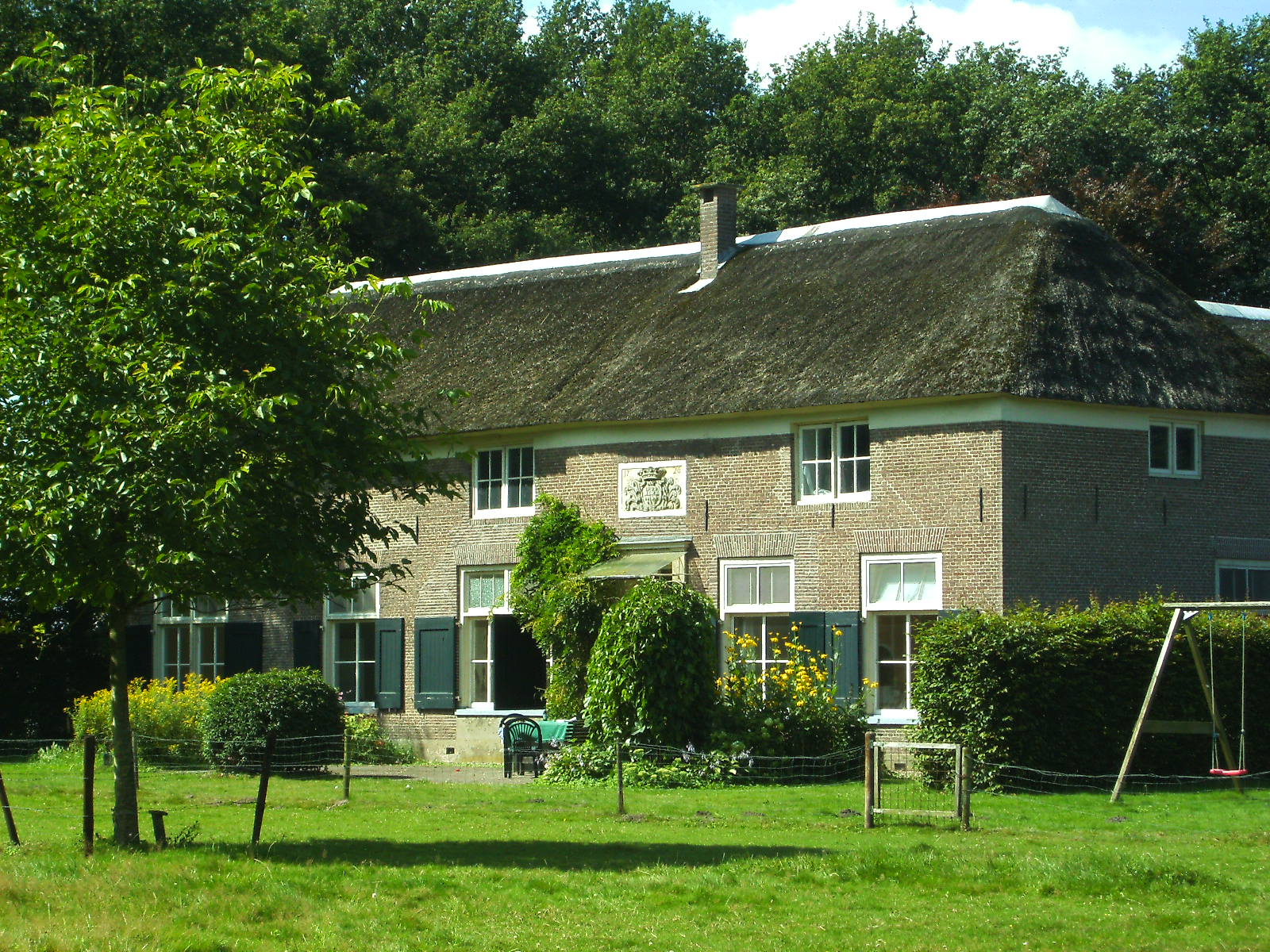 Boerderij bij Twello. Voormalig koetshuis bij het eind negentiende eeuw gesloopte landhuis Wezenveld. De grote gevelsteen met wapen is waarschijnlijk afkomstig van het landhuis.